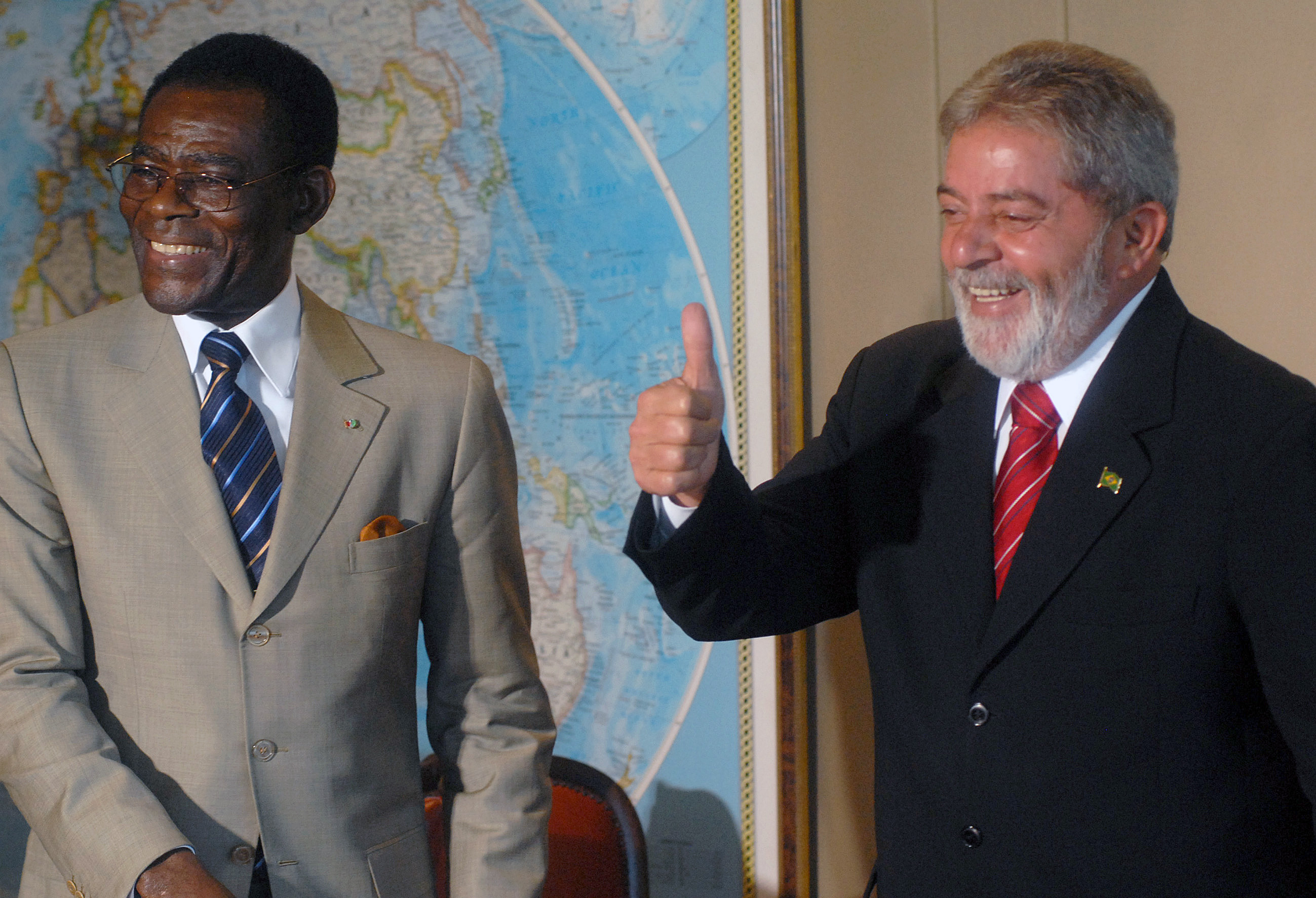 Teodoro Obiang Nguema Mbasogo, President of Equatorial Guinea, with Luiz Inácio Lula da Silva, President of Brasil